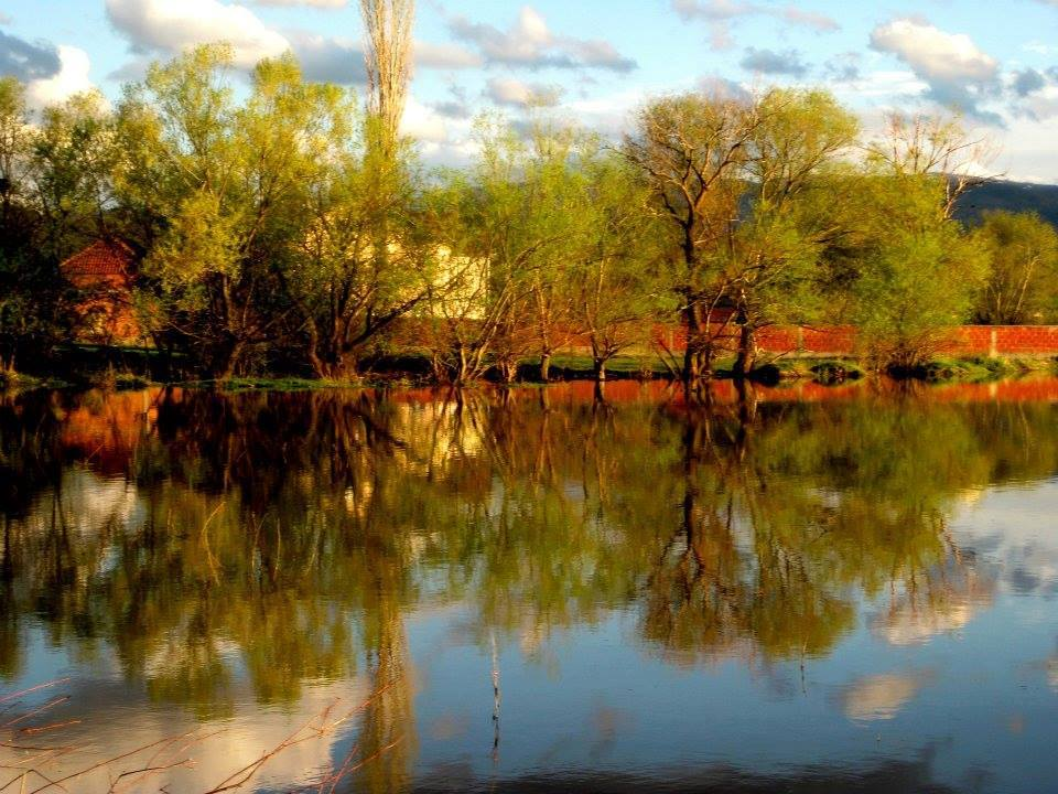 Anamorava ne budrig te gjilanit.